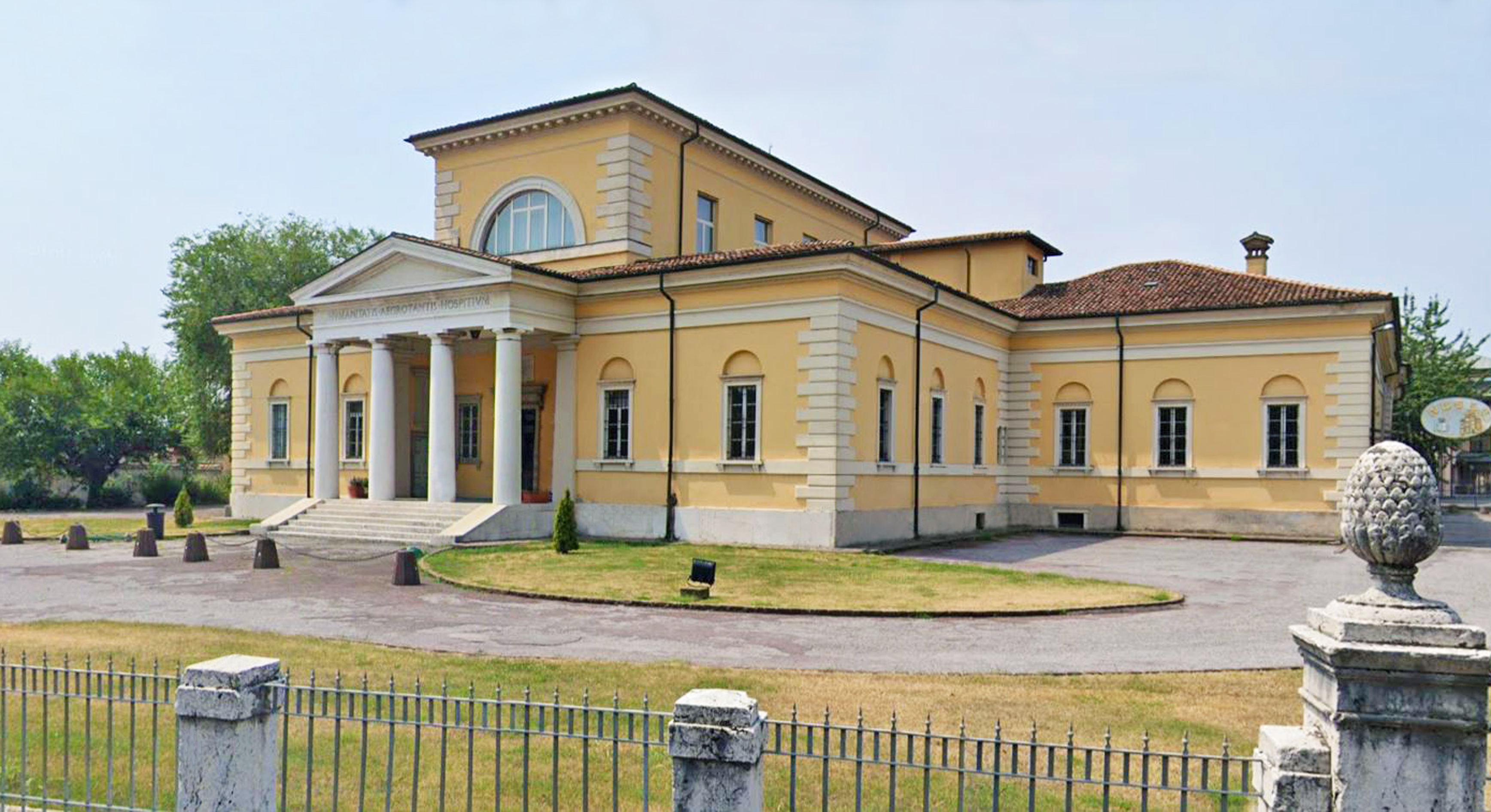 Biblioteca comunale di Travagliato